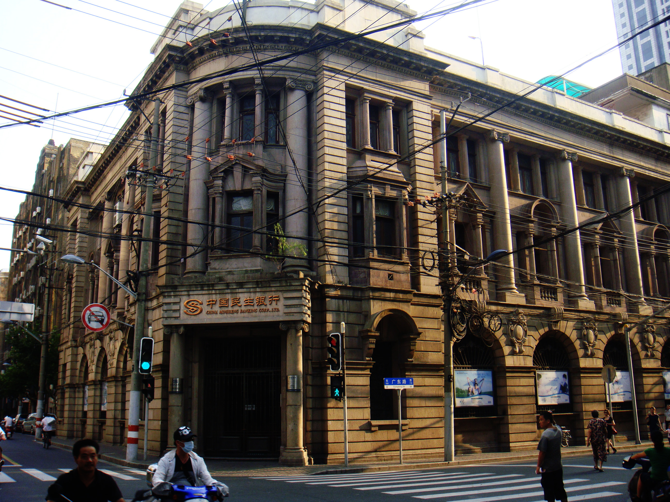 永年大楼正立面